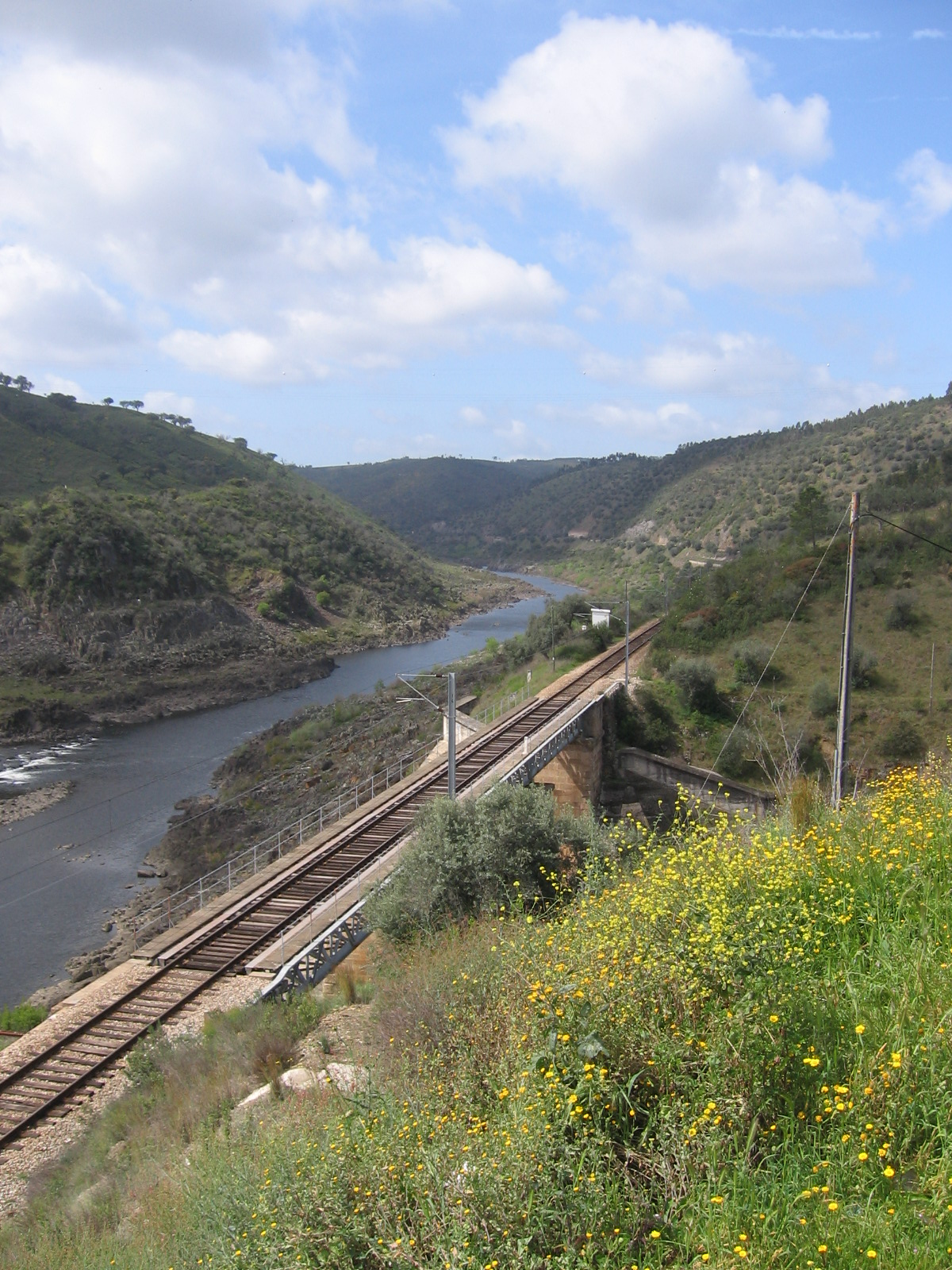 Linha da Beira Baixa a jusante da barragem de Fratel